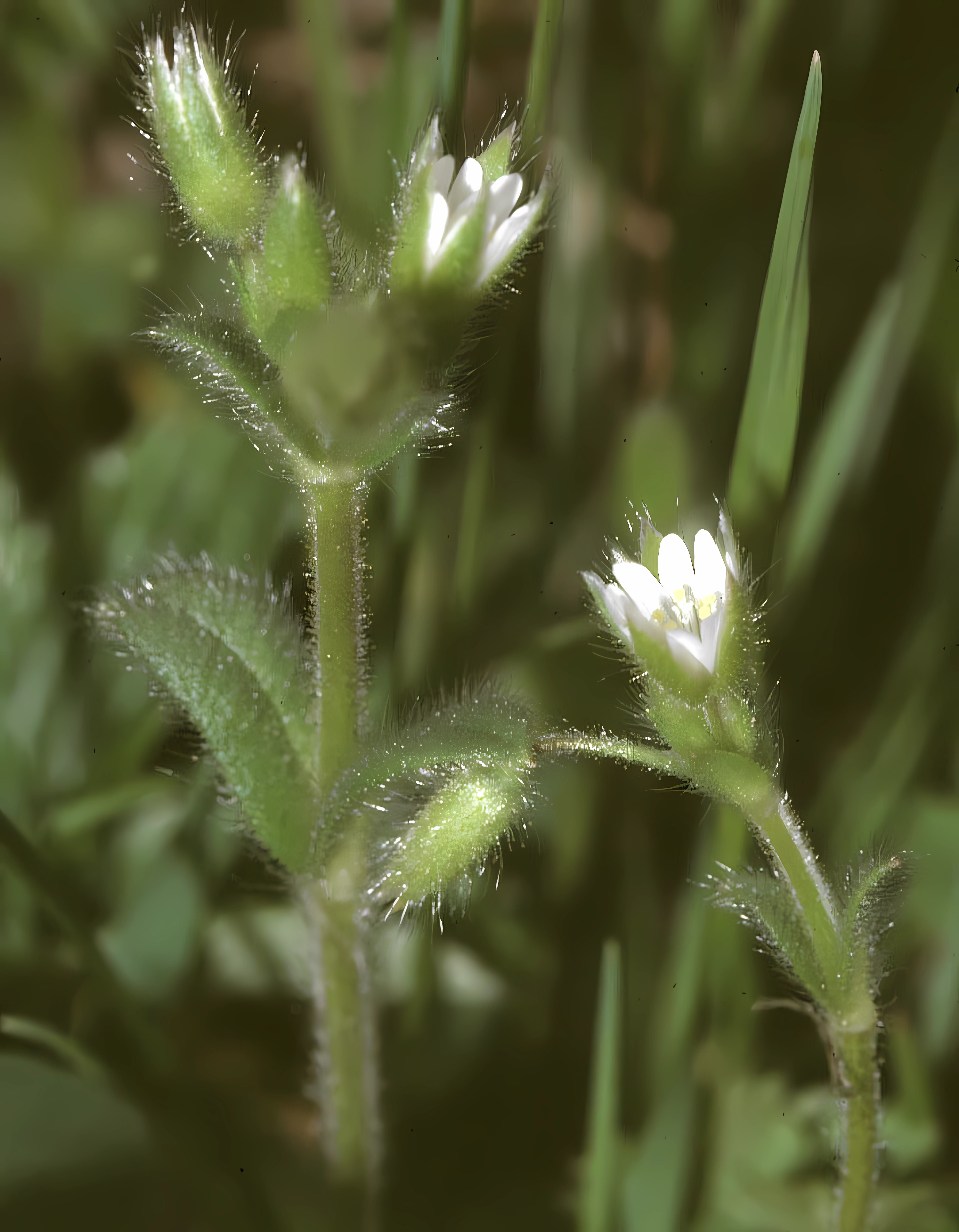 eigenes Foto von 1987, Unterfranken